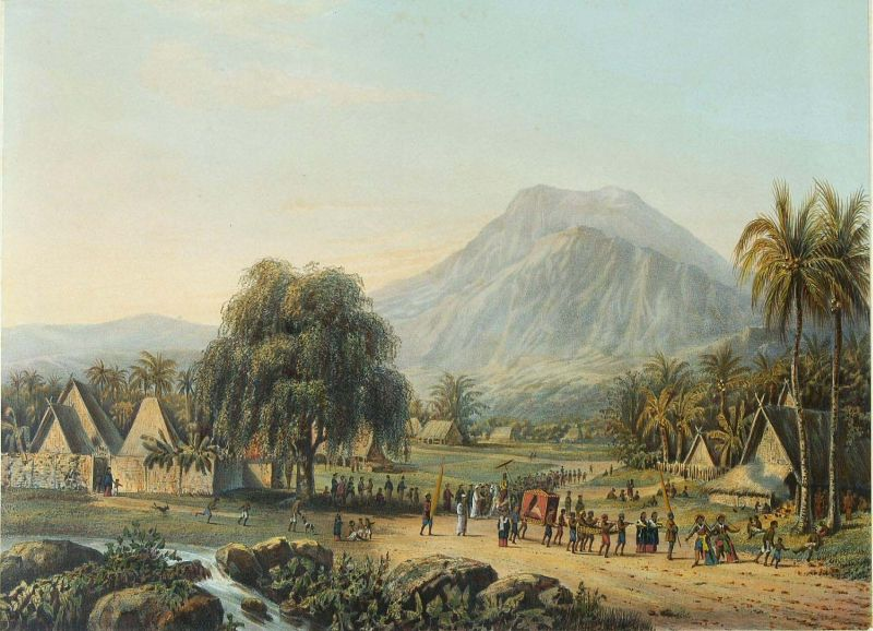 Litho. Litho naar een oorspronkelijk schilderij van A. Salm.. Een huwelijksoptocht in de vallei van de berg Salak